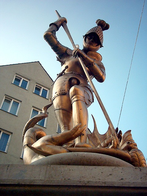 Augsburg (Bayern): Georgsbrunnen vor der Stadtmetzg, das ehemalige Zunfthaus der Metzger (beherbergt jetzt das Sozialamt). Gleich daneben befindet sich das Internationale Kulturhaus Kresslesmühle.